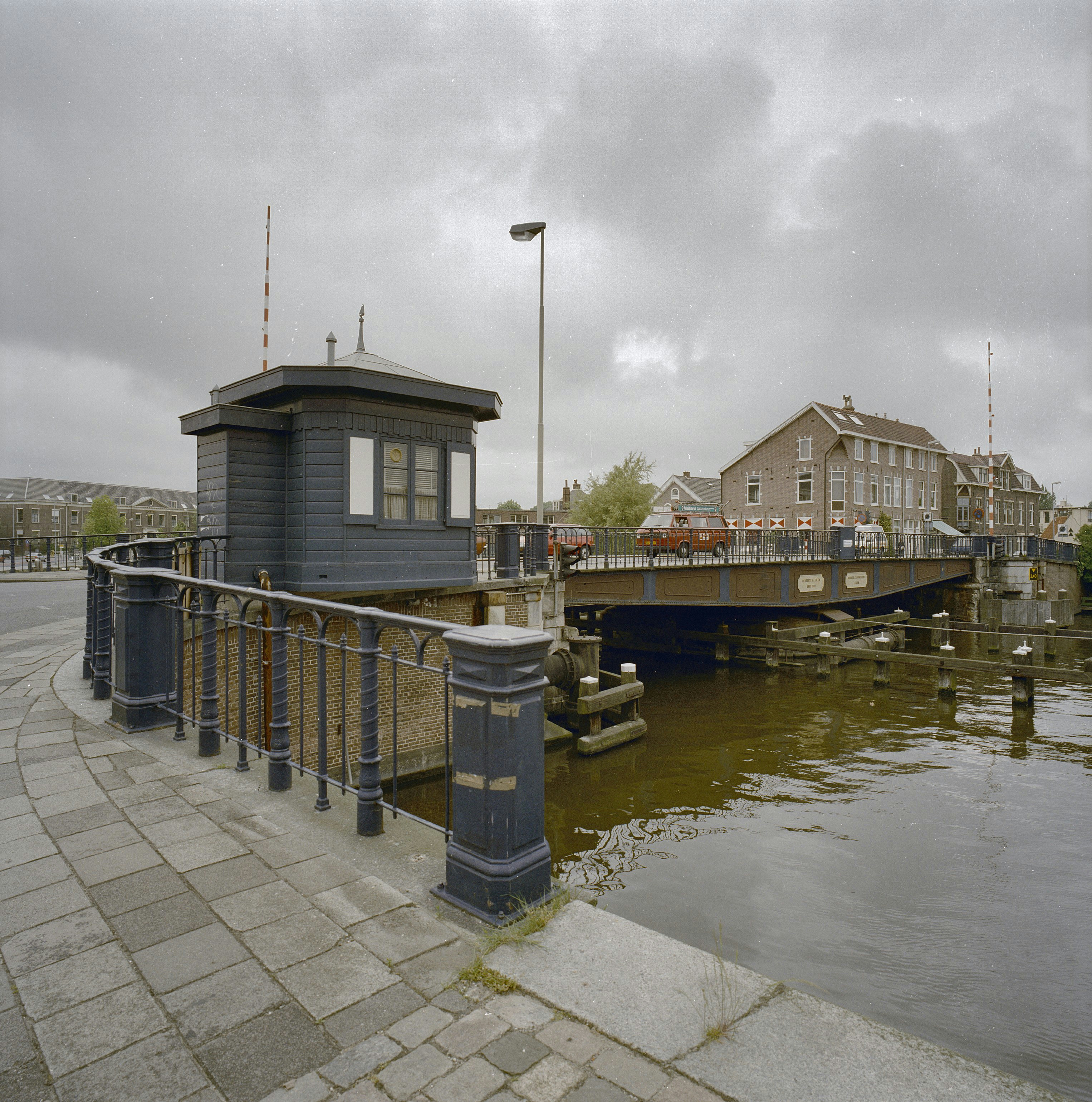 DRAAIBRUG: Exterieur OVERZICHT DRAAIBRUG